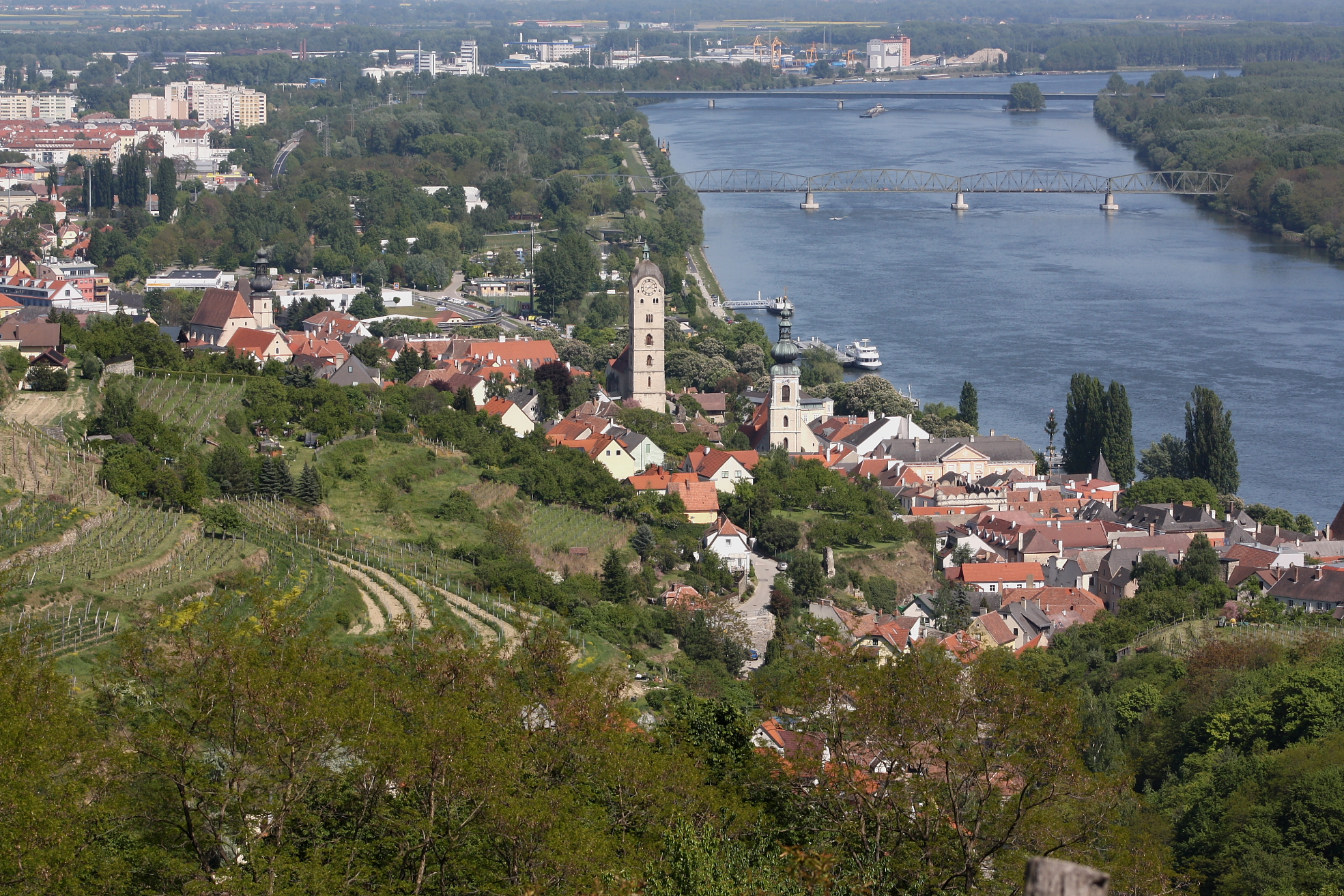 Westansicht des Ortsteils Stein an der Donau der niederösterreichischen Stadt Krems an der Donau.